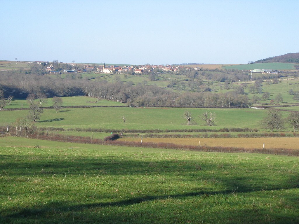 vue générale du village de Vignol (Nièvre) en hiver